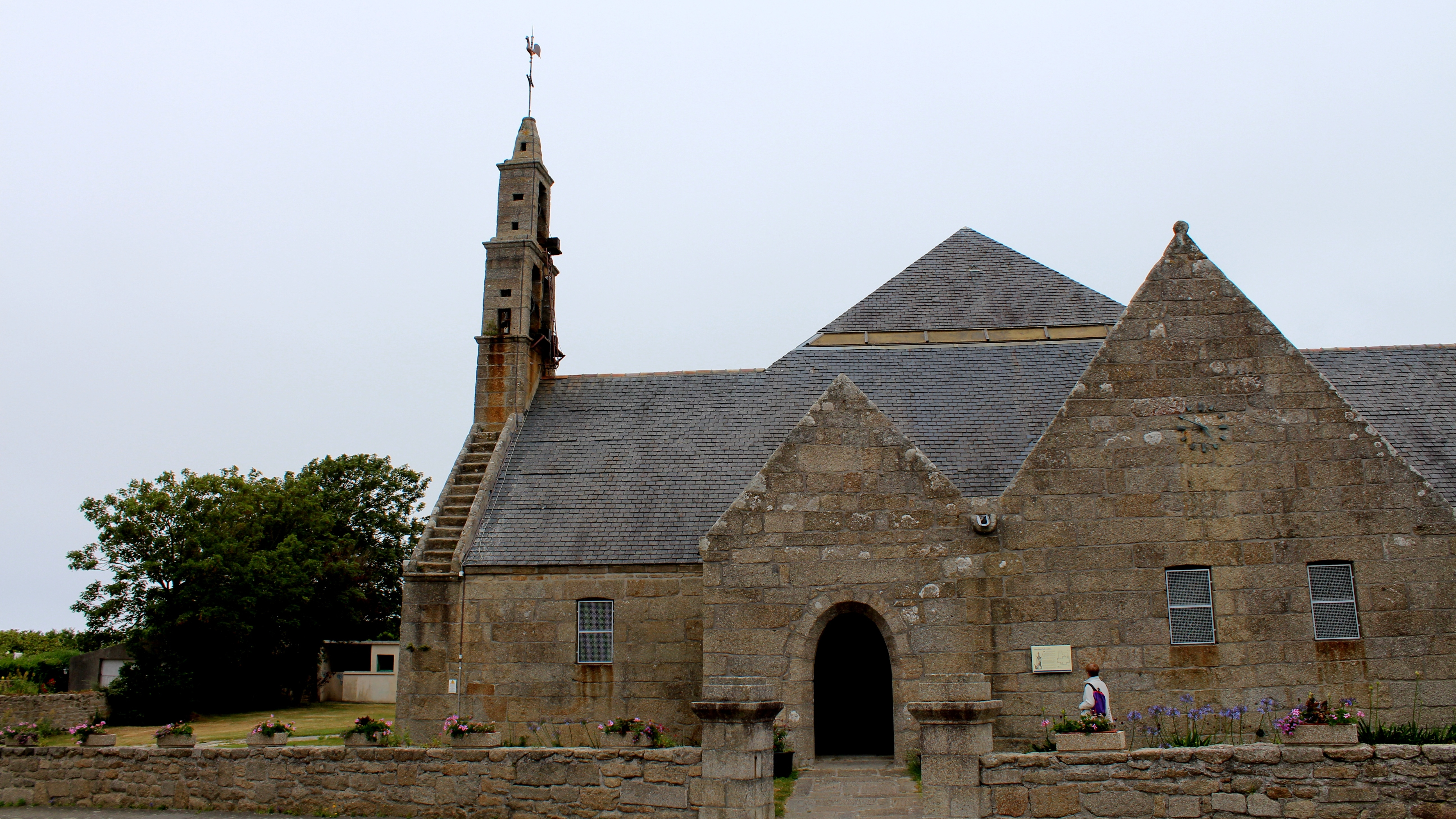 Lampaul-Plouarzel Eglise St Pol Aurélien